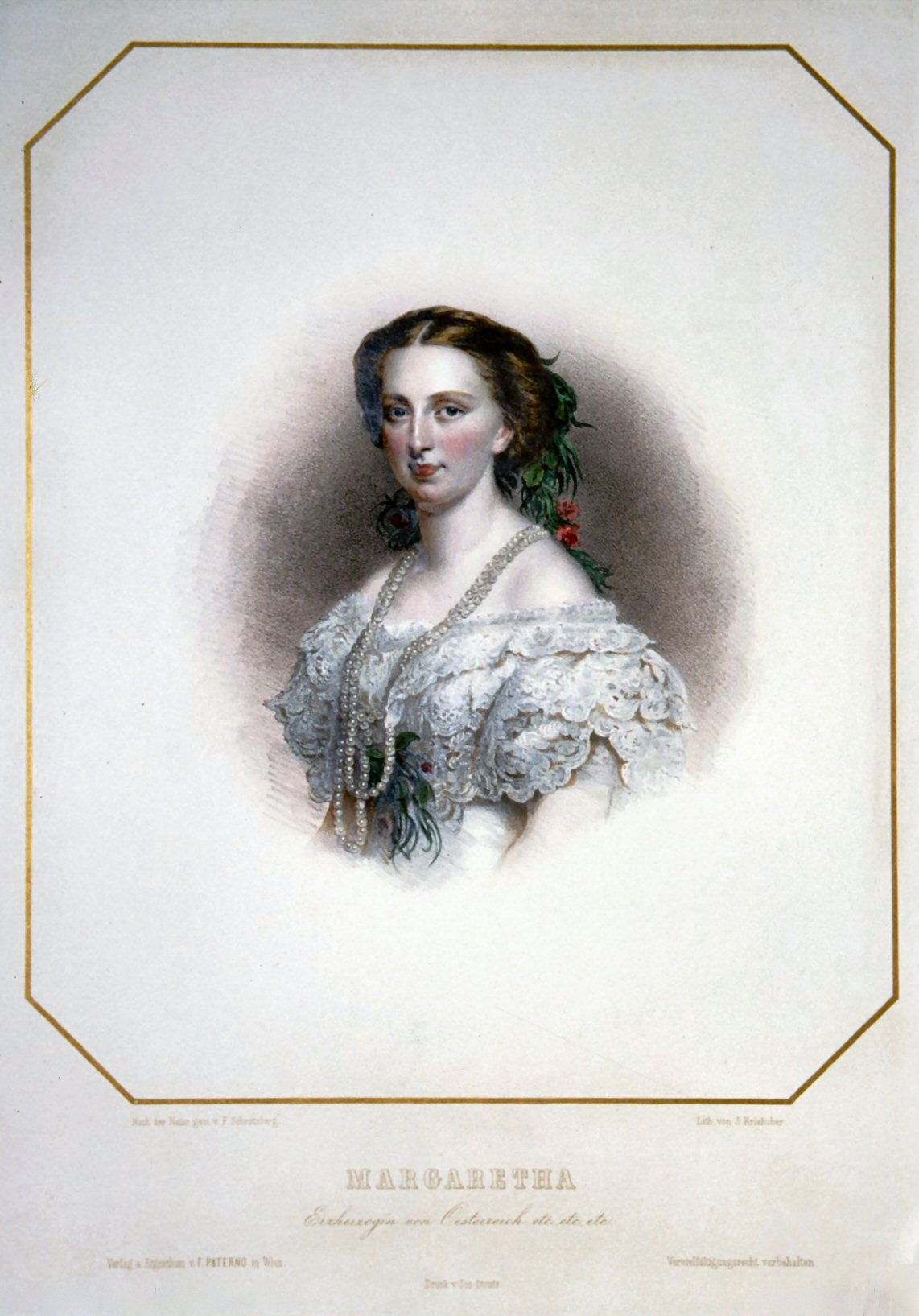 Margarethe von Sachsen, Erzherzogin von Österreich